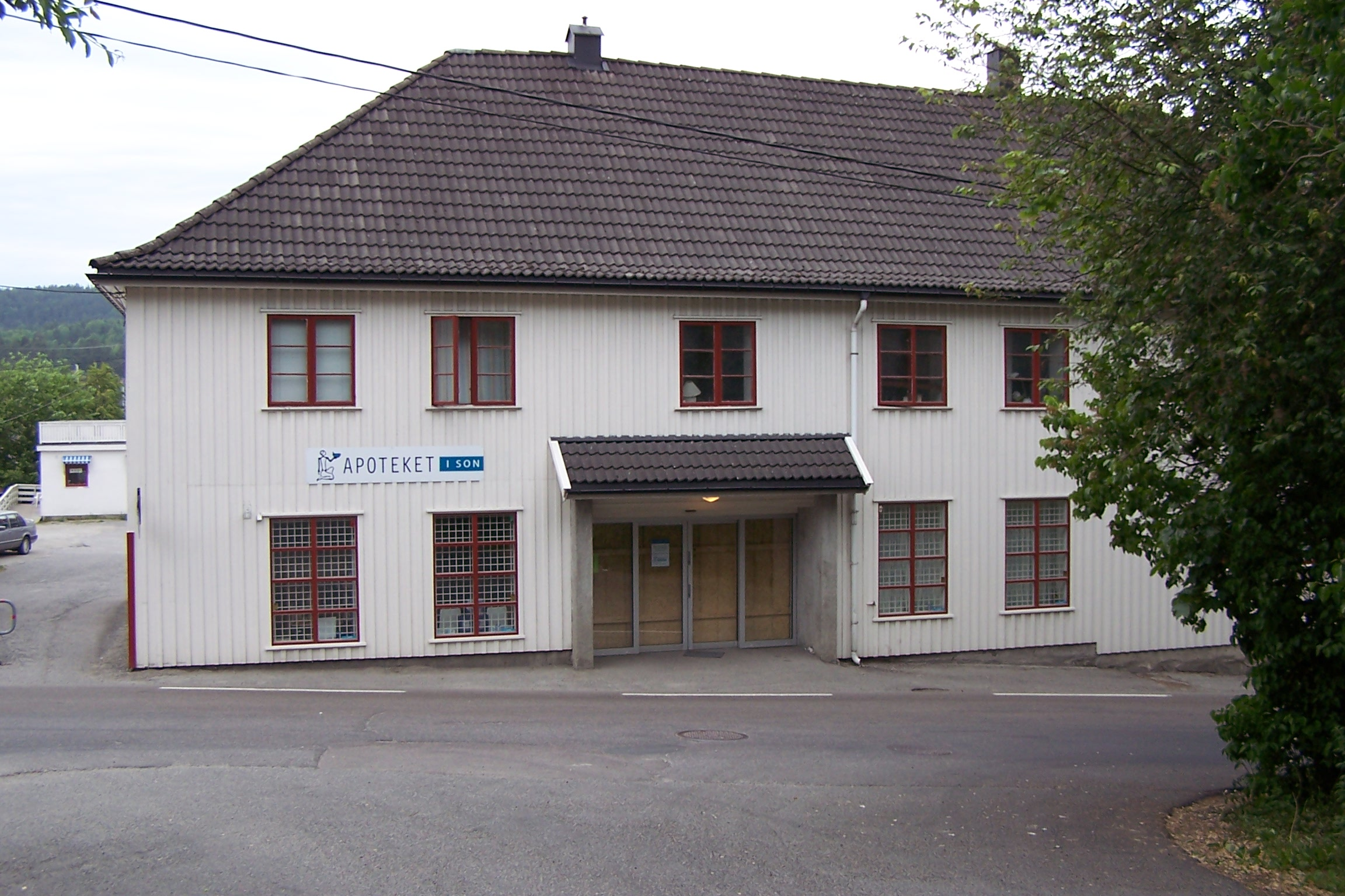 Son, Norway: Huitfeldtgården